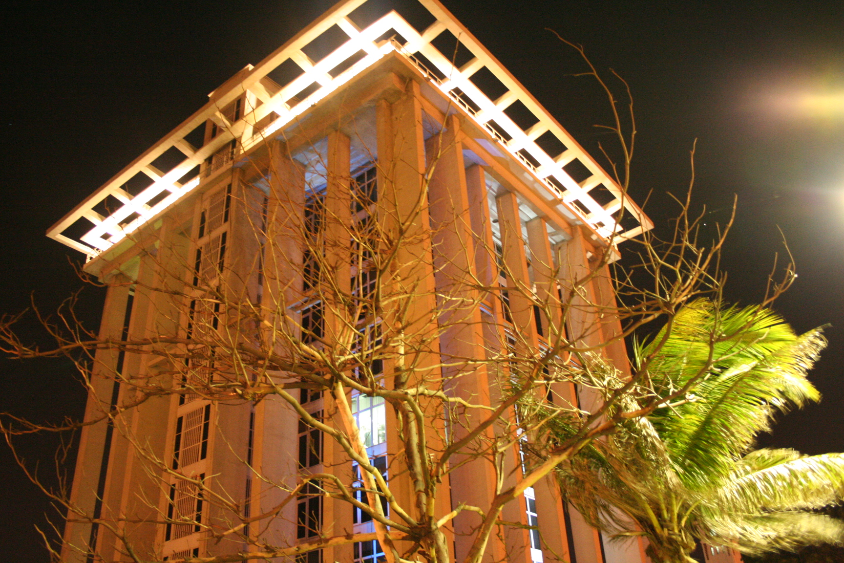 Veracruz,Veracruz.